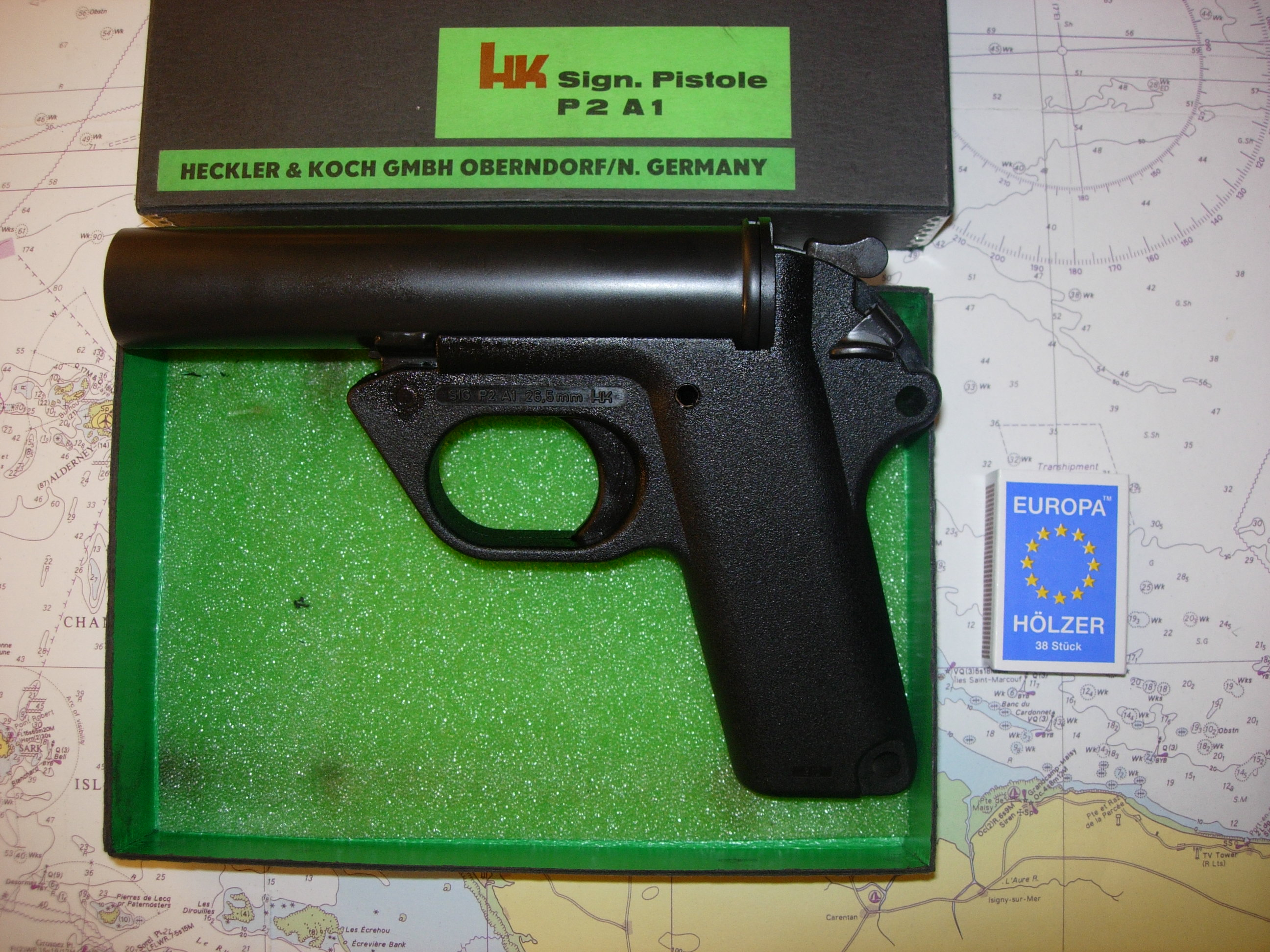 P2 A1 Signalpistole von Heckler & Koch